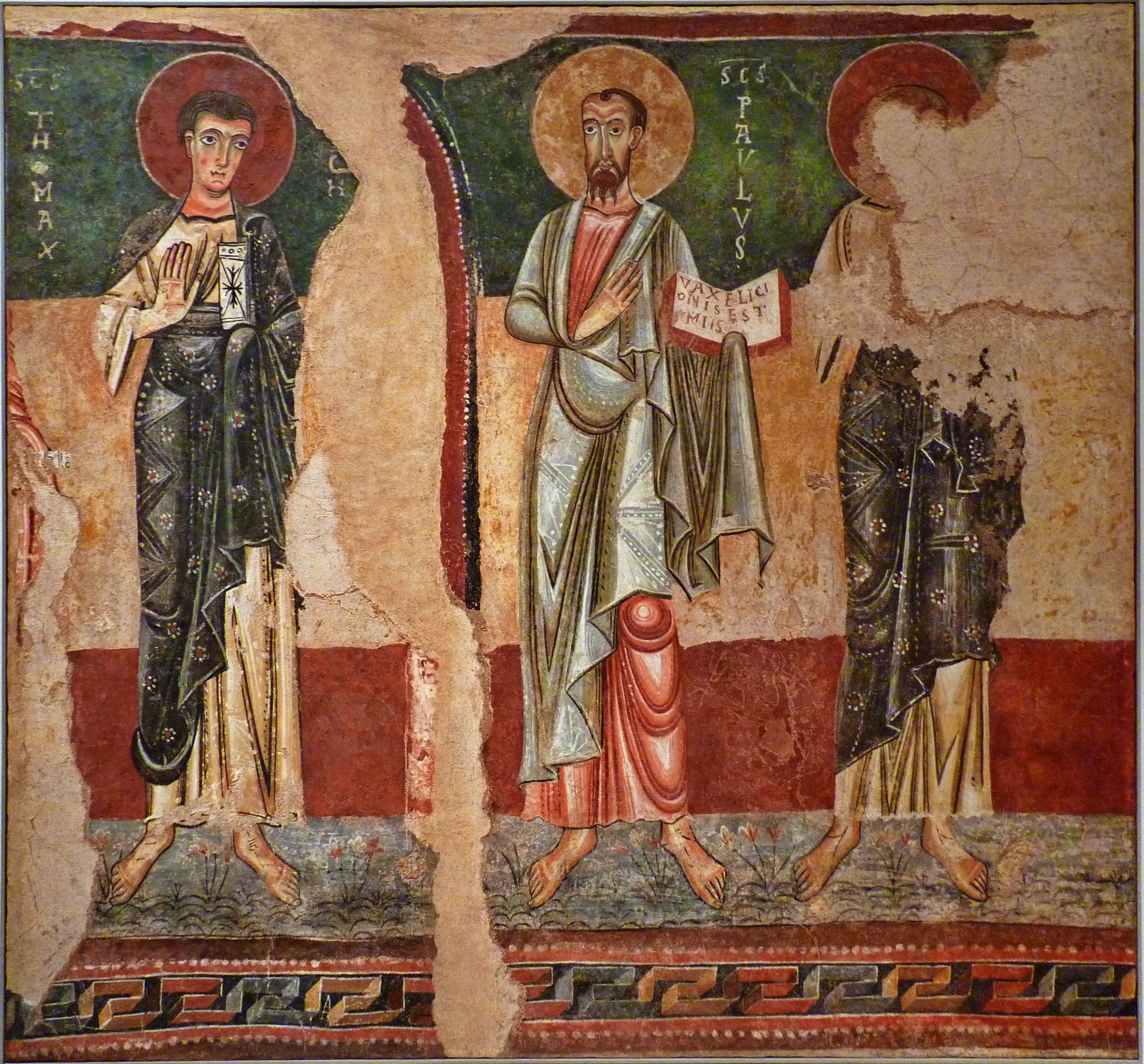 Decoració de l'absis, de la qual encara hi ha vestigis in situ. Procedeix de l'antiga església de Santa Maria del castell d'Orcau (Isona i Conca Dellà, Pallars Jussà).